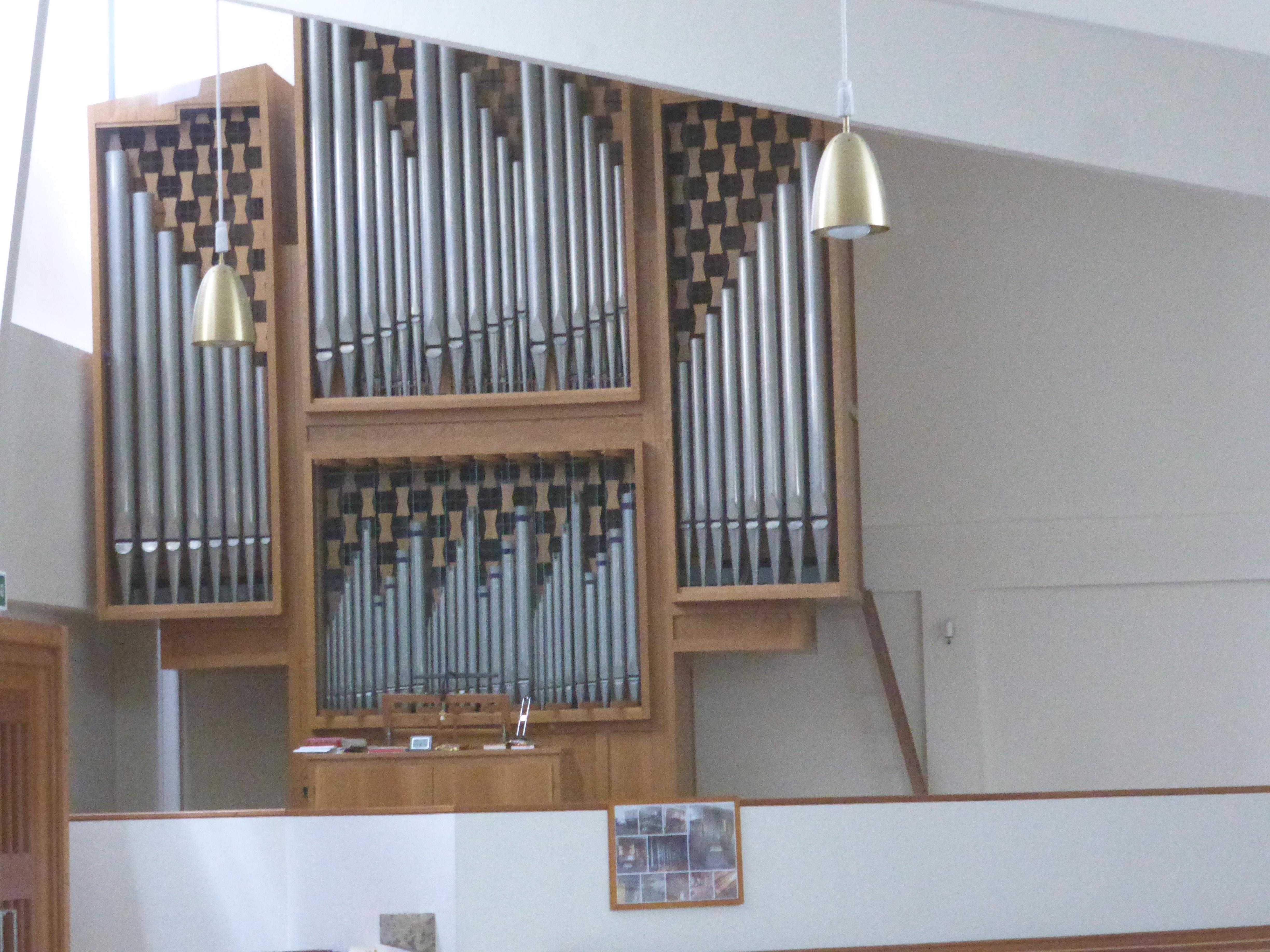 Ger Mayer Orgel 1975 in St. Severin, früher Riegelsberg St. Elisabeth